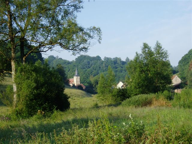 lengelsheim